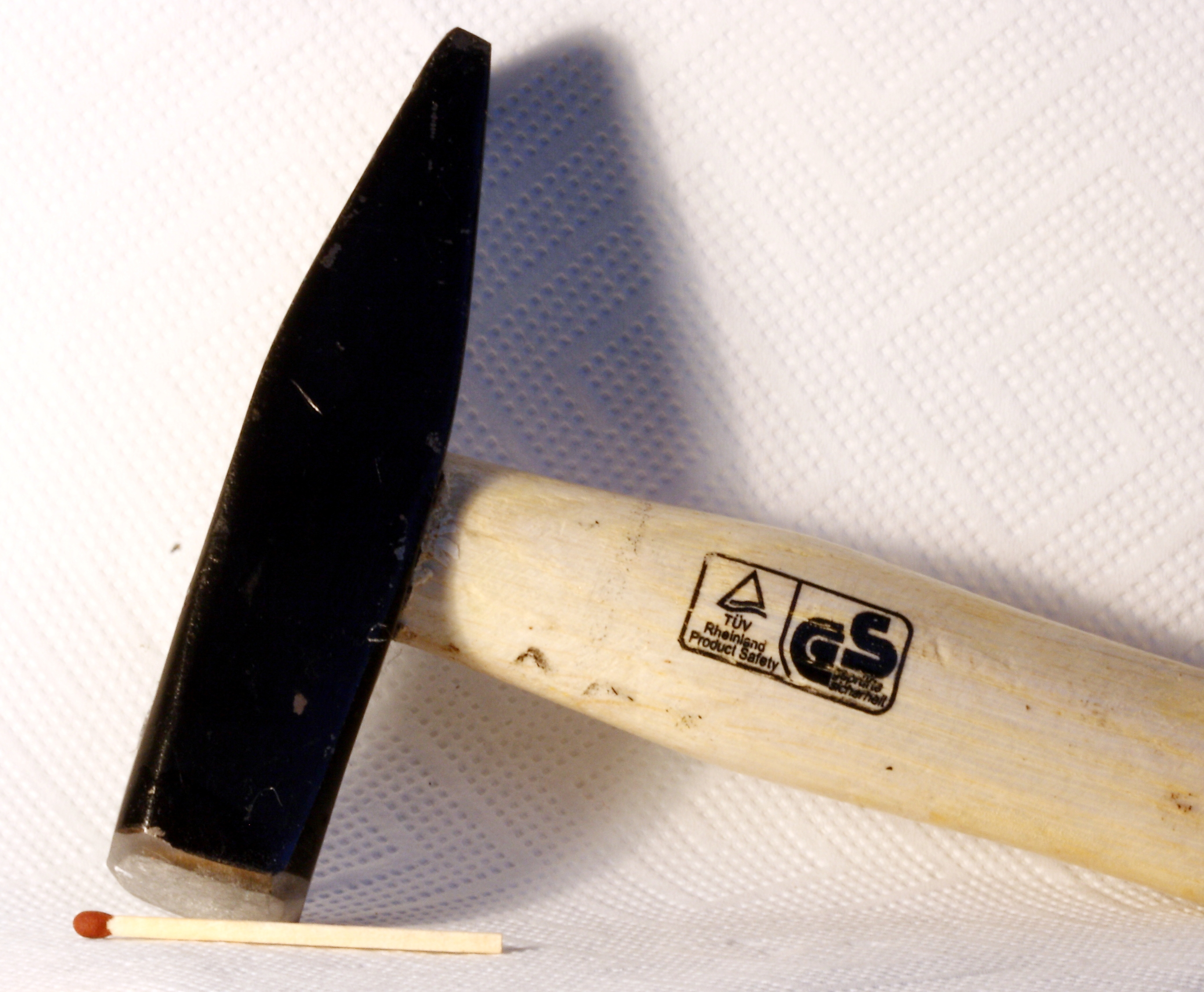 Hammer